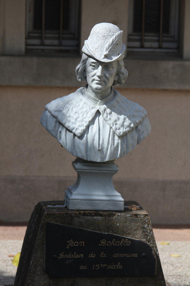 La statue de Jean Bohalle située face à la mairie de la Bohalle